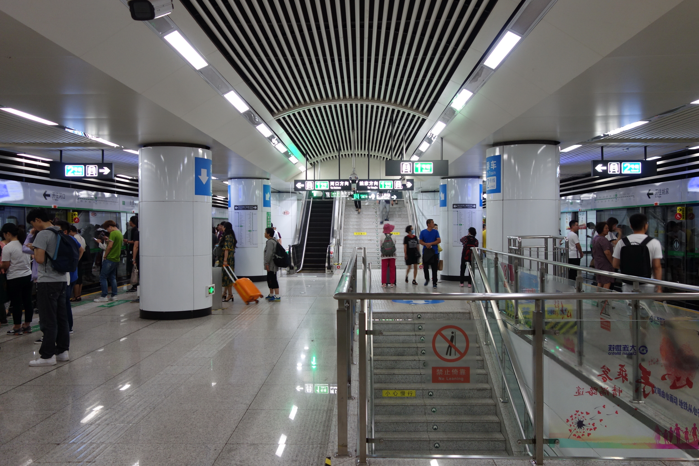 大连地铁1号线西安路站岛式站台